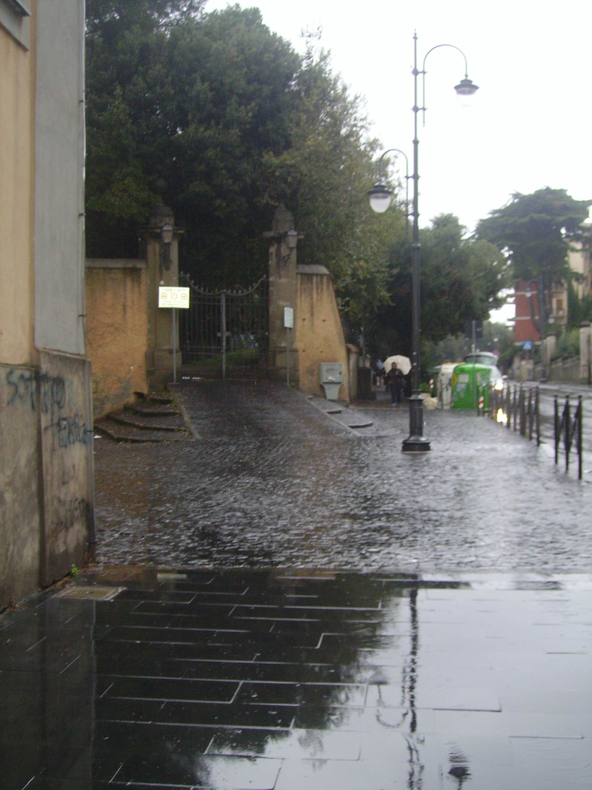 Ingresso Villa Desideri a Marino